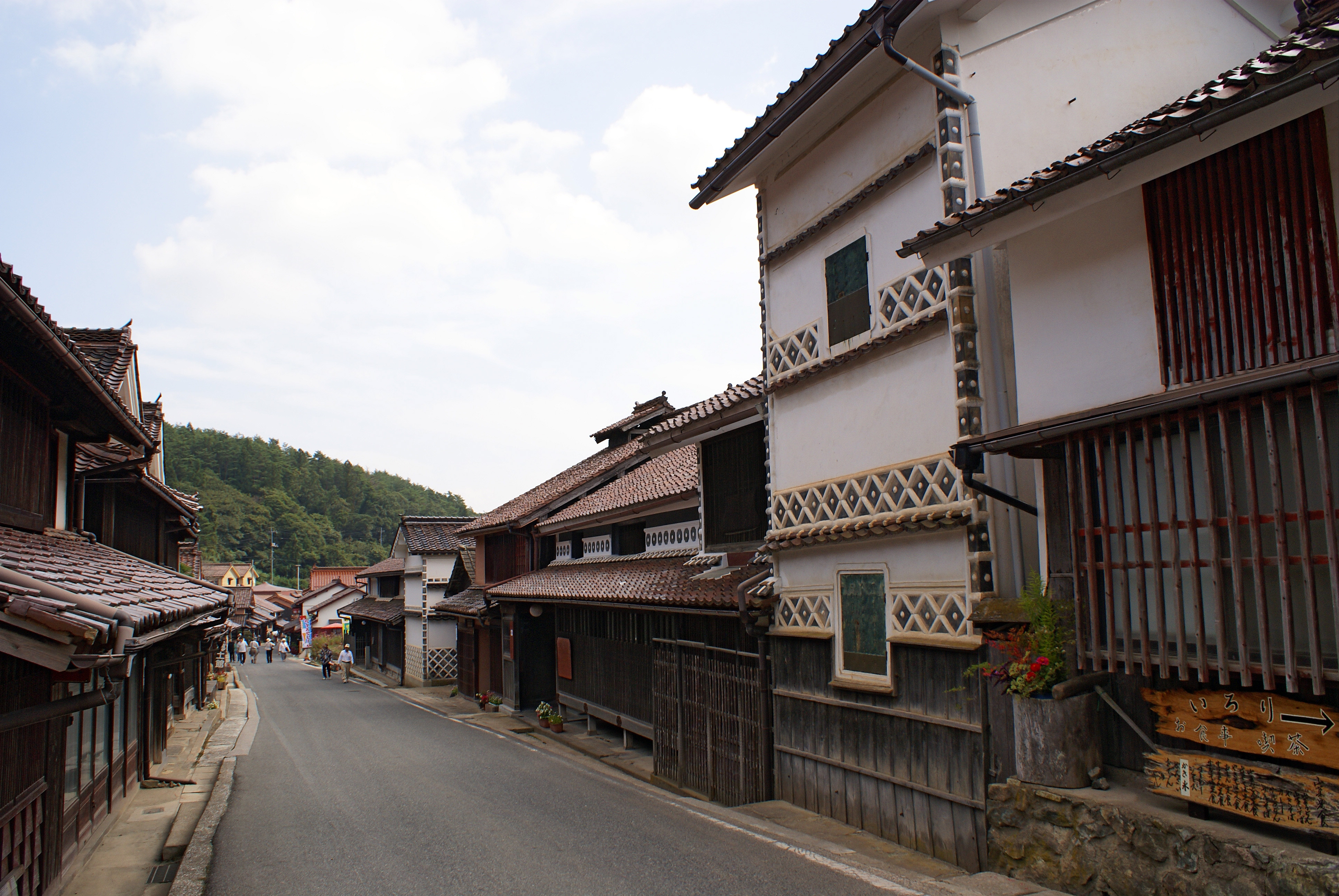 Old Katayama house in Takahashi, Okayama, Japan